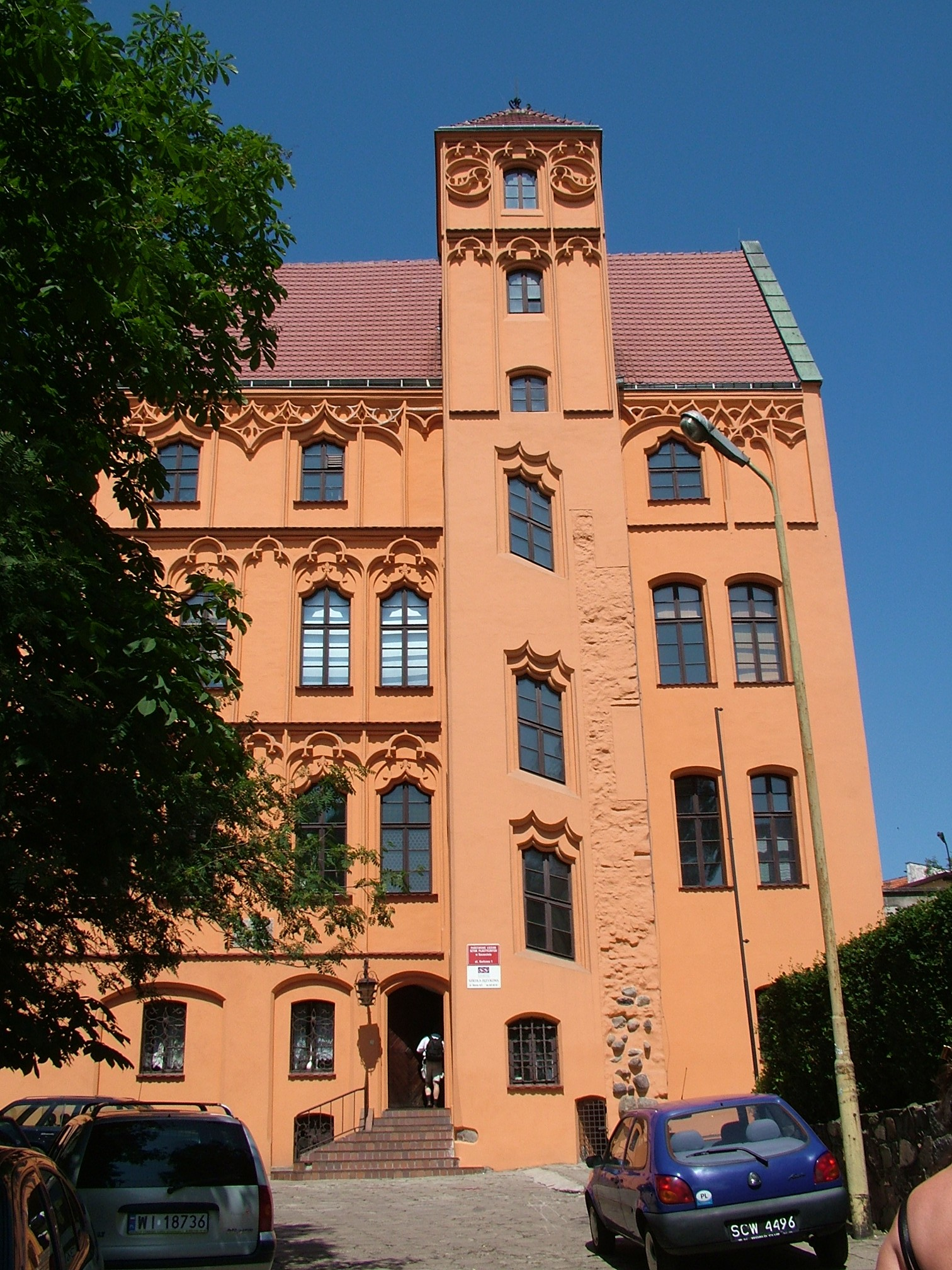 Loitz's tentment in Szczecin.